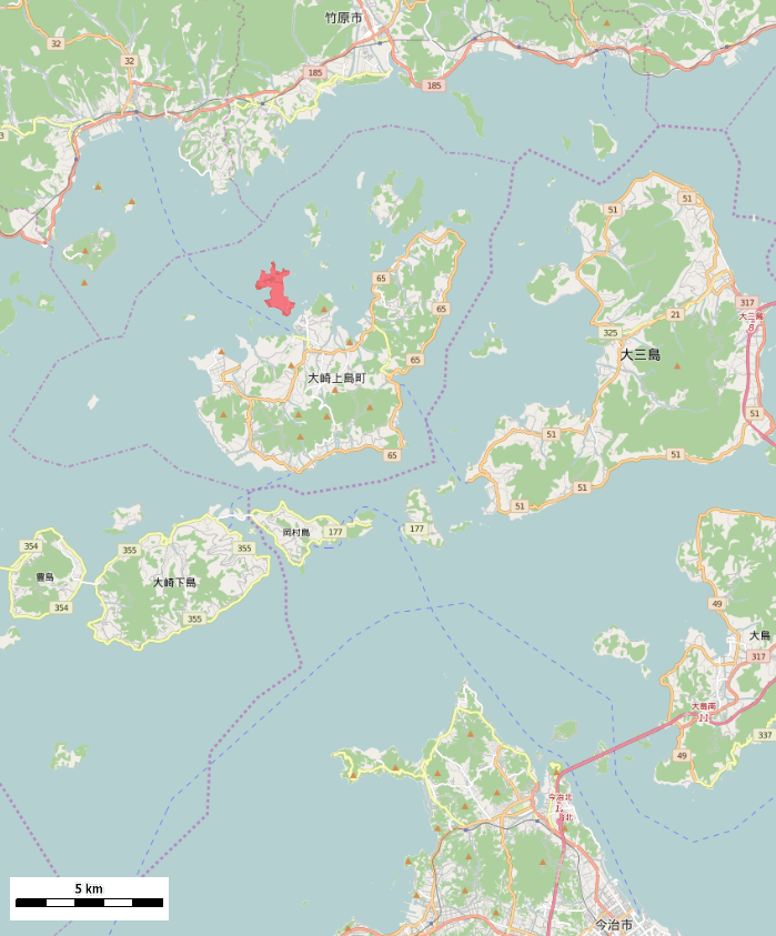 広島県大崎上島町の長島周辺 This map may be incomplete, and may contain errors. Don't rely solely on it for navigation.